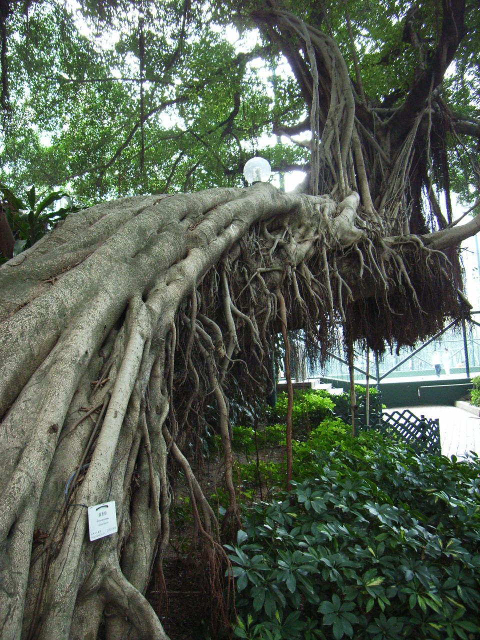 香港zh:上環zh:普仁坊zh:卜公花園, Sheung Wan, Hong Kong